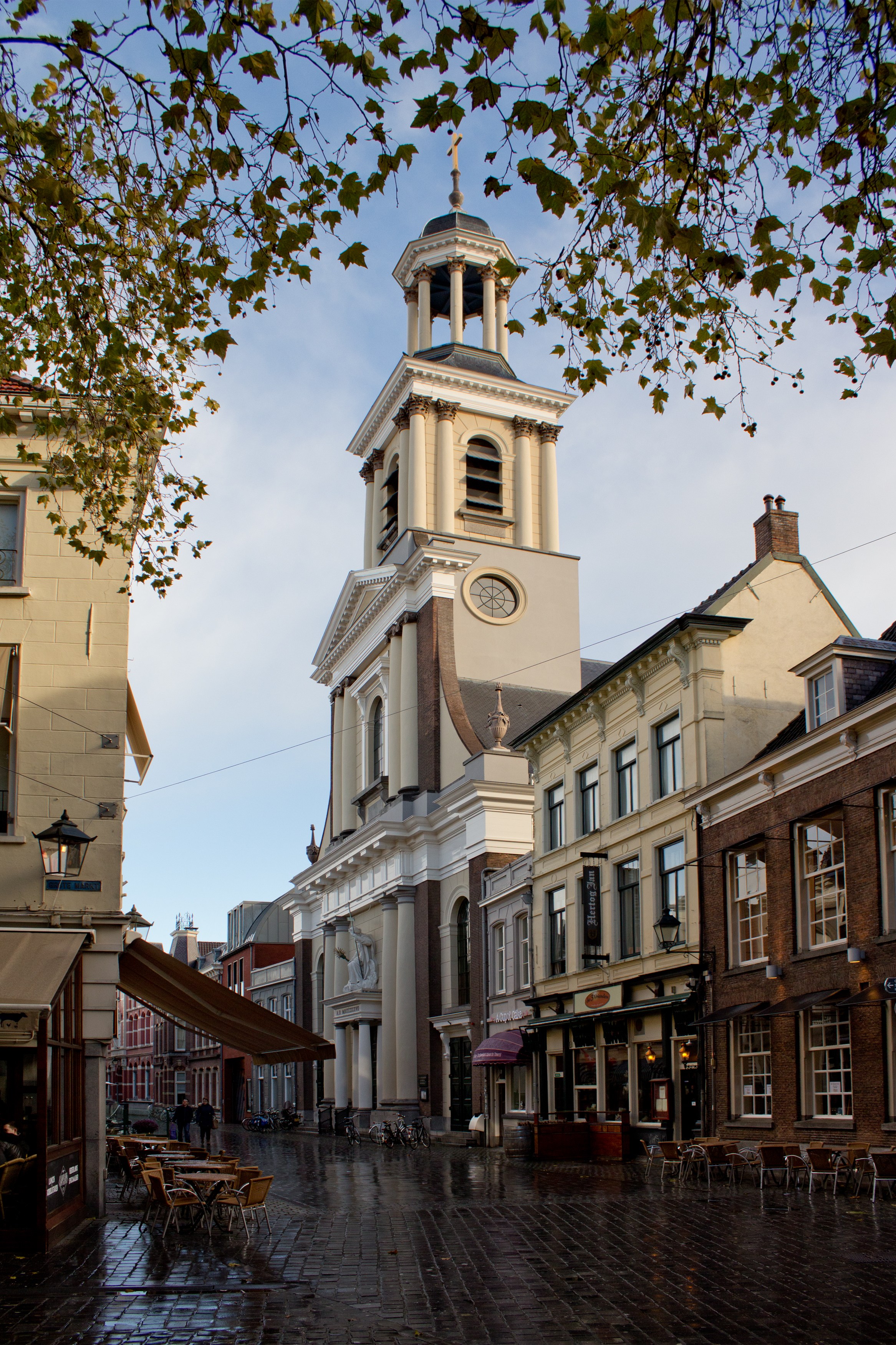 Breda, Sint Anthoniuskerk